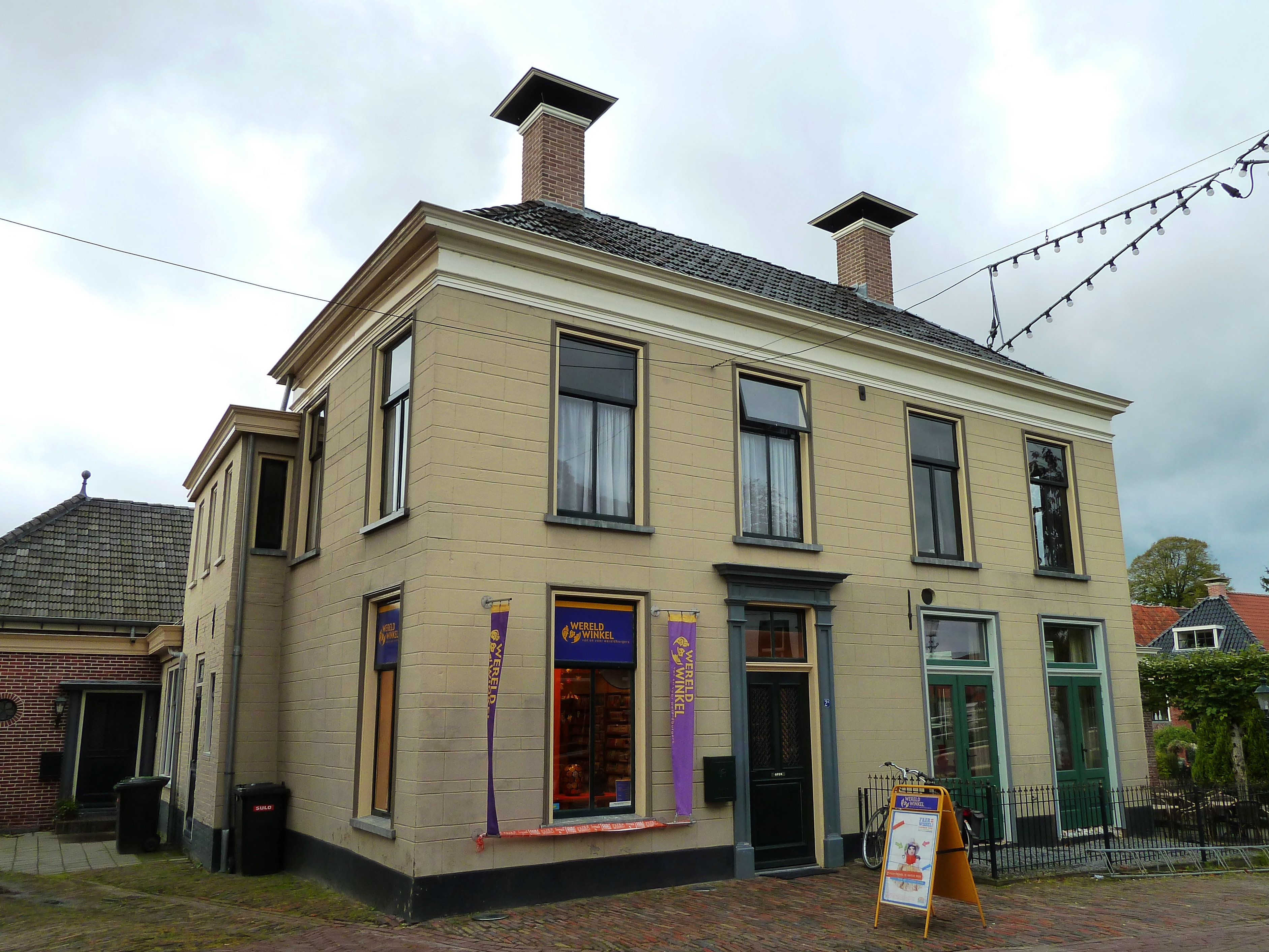 Hoofdstraat Winsum 2a in het Groningse dorp Winsum.